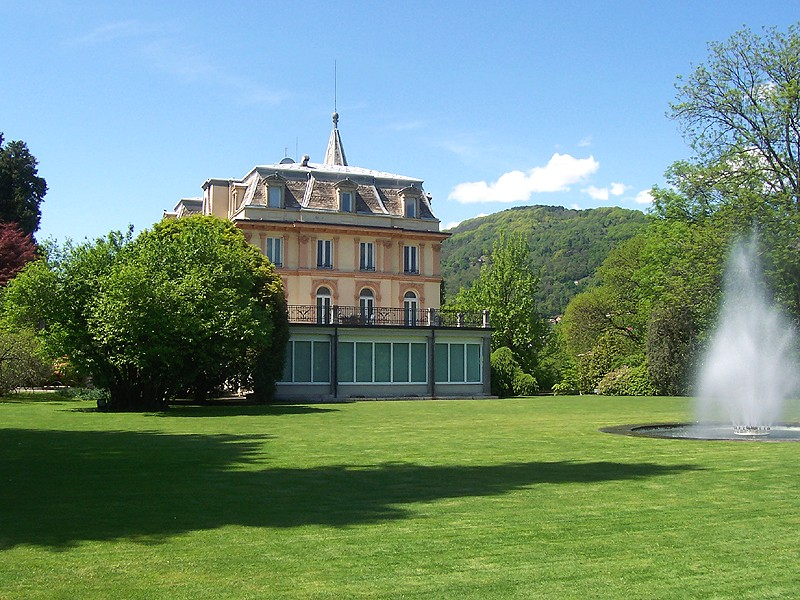 Verbania - Villa Taranto